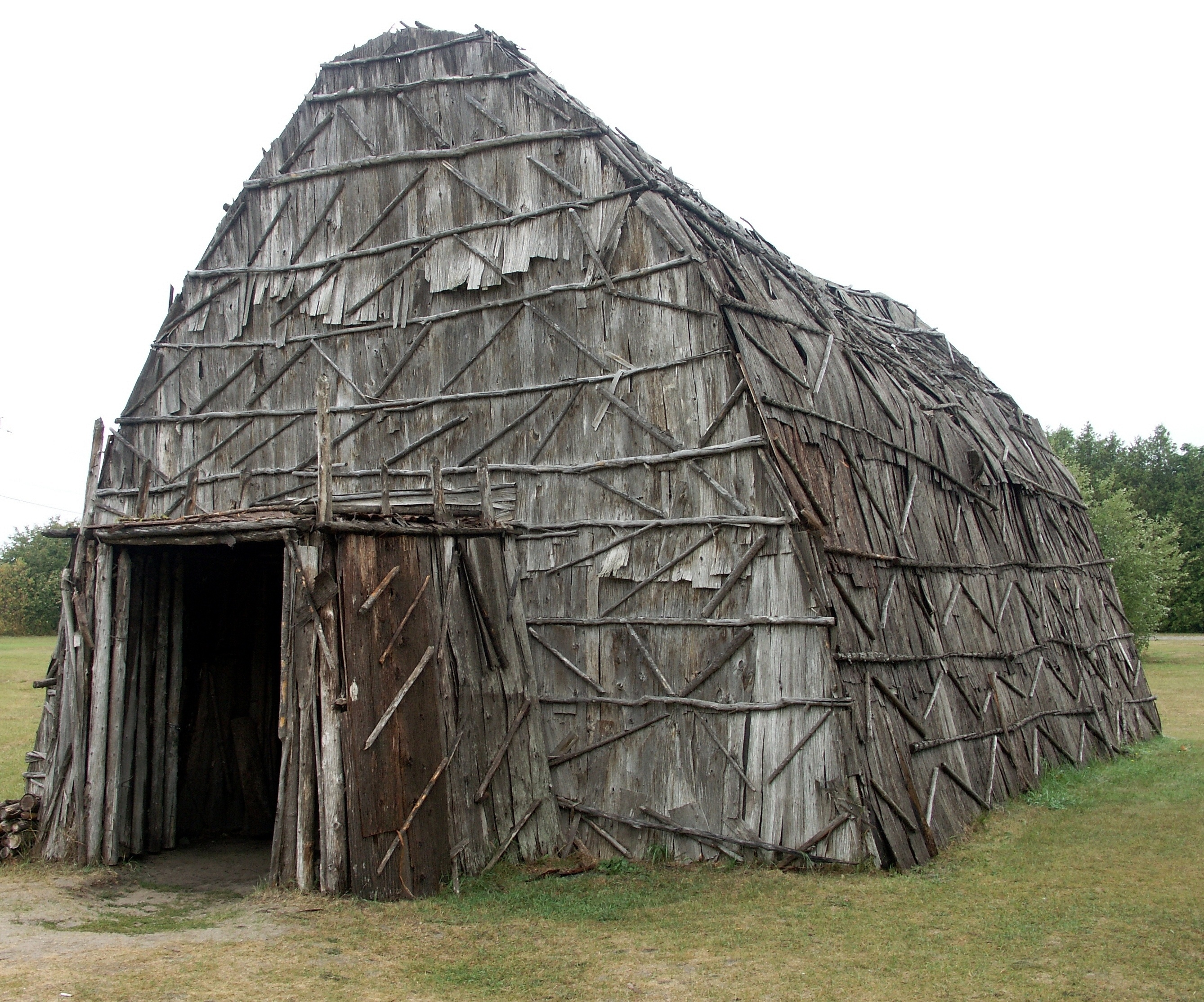 Rekonstruktion eines Huron-Langhauses (im Ojibwa-Museum in St. Ignace)